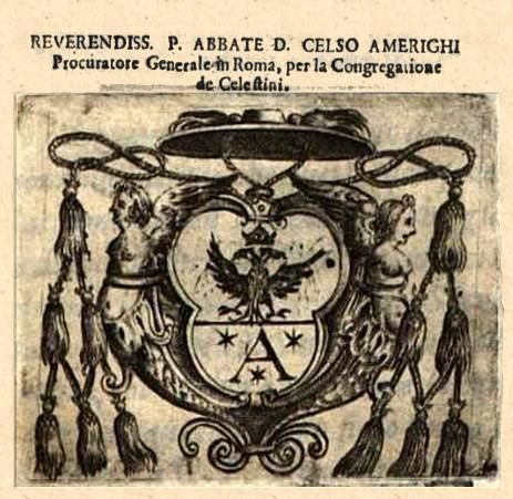 Abate Celso Amerighi stemma con ornamenti